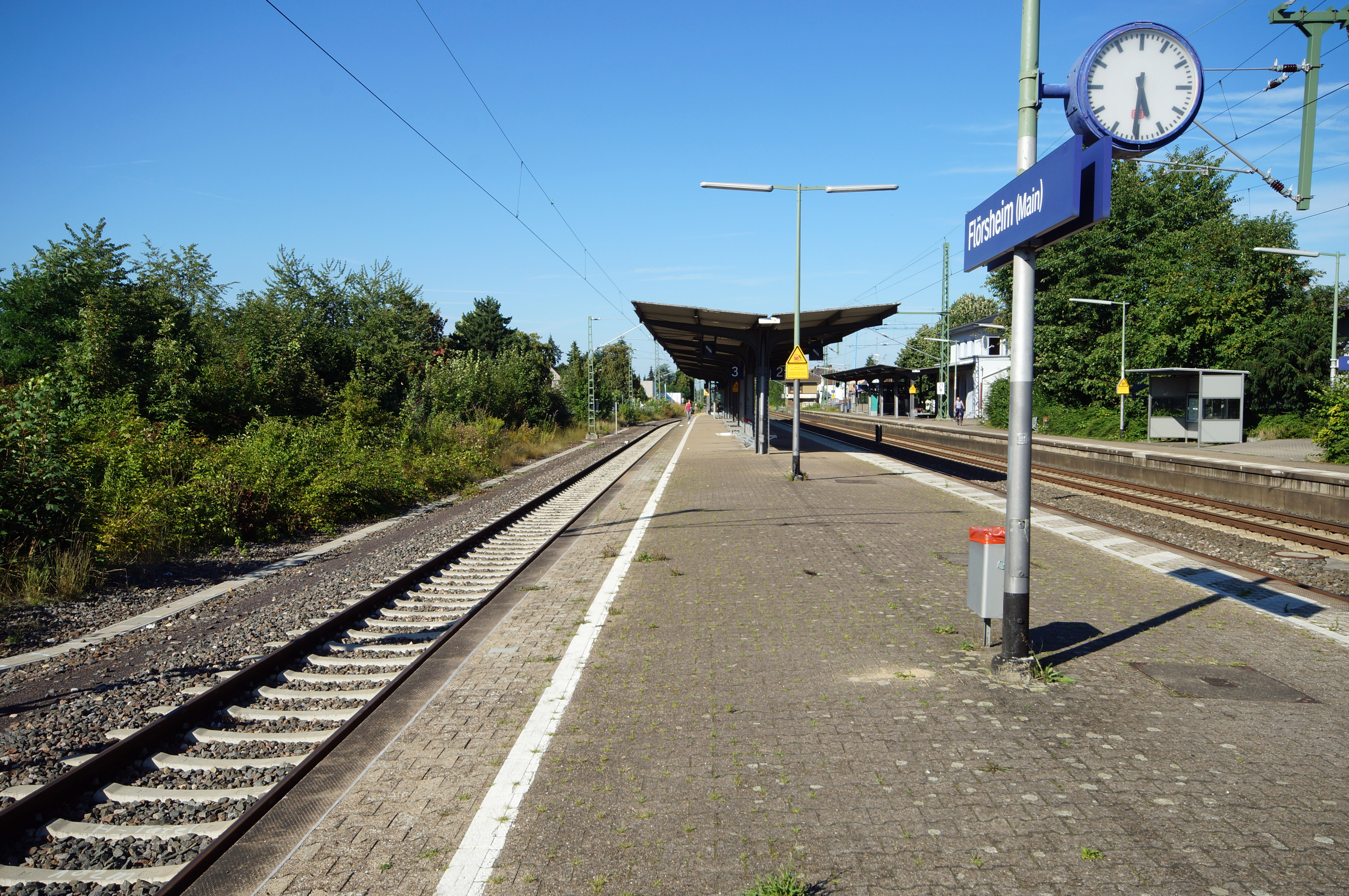 Bahnsteige des Bahnhofs Flörsheim (Main) auf der Gemarkung der Stadt Flörsheim am Main in Hessen